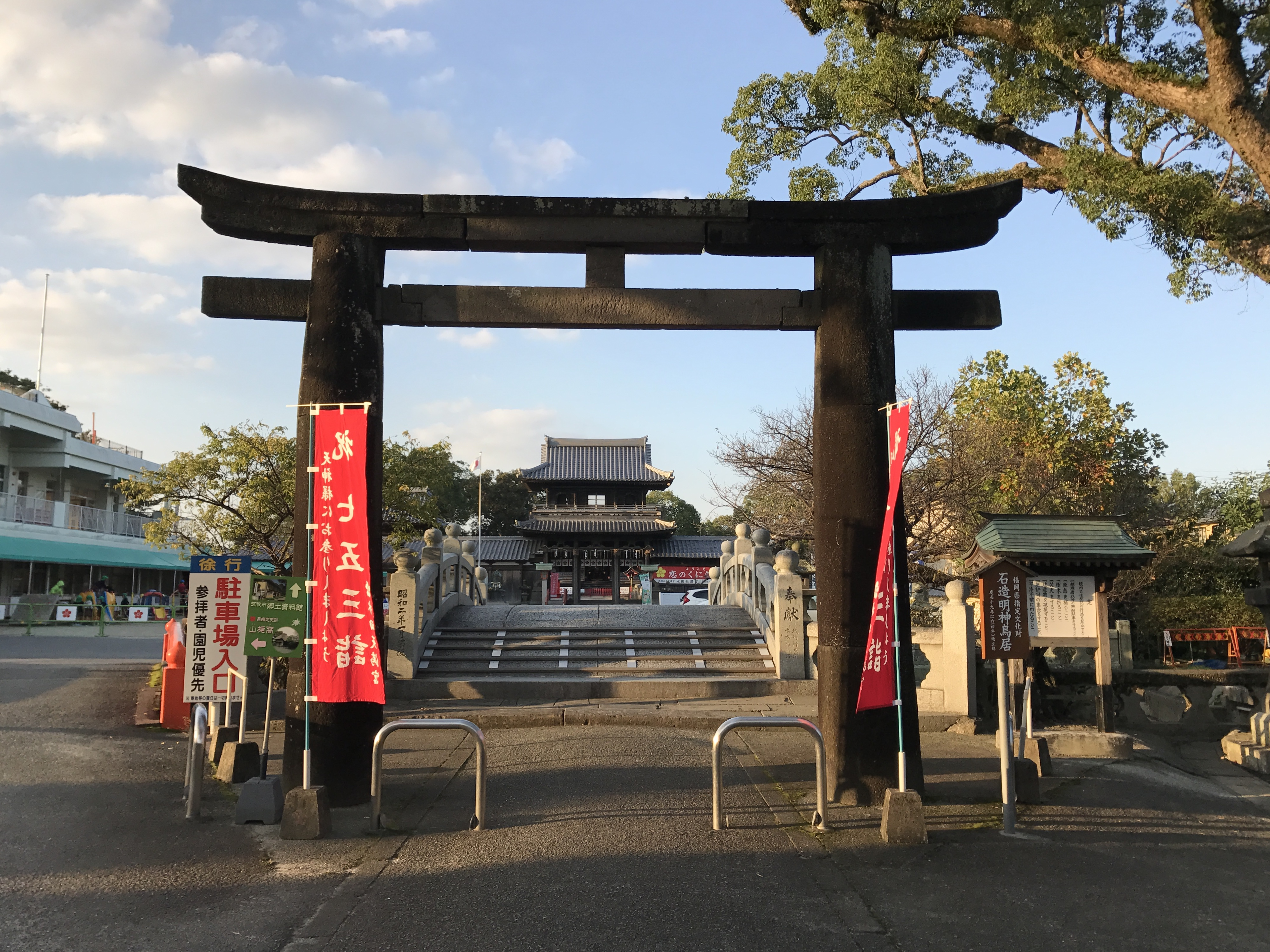 水田天満宮の石鳥居と楼門